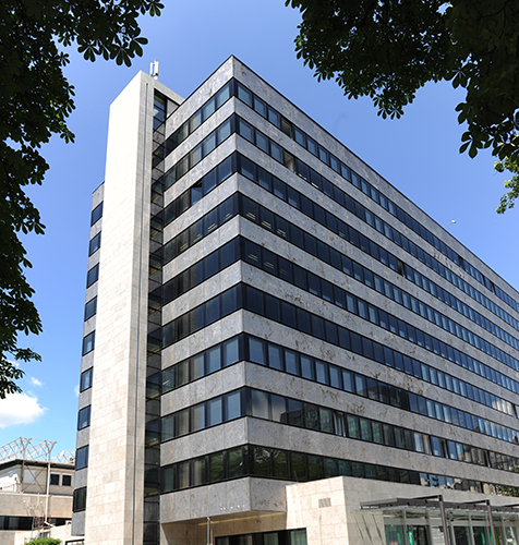 Kelag Zentrale in Klagenurt